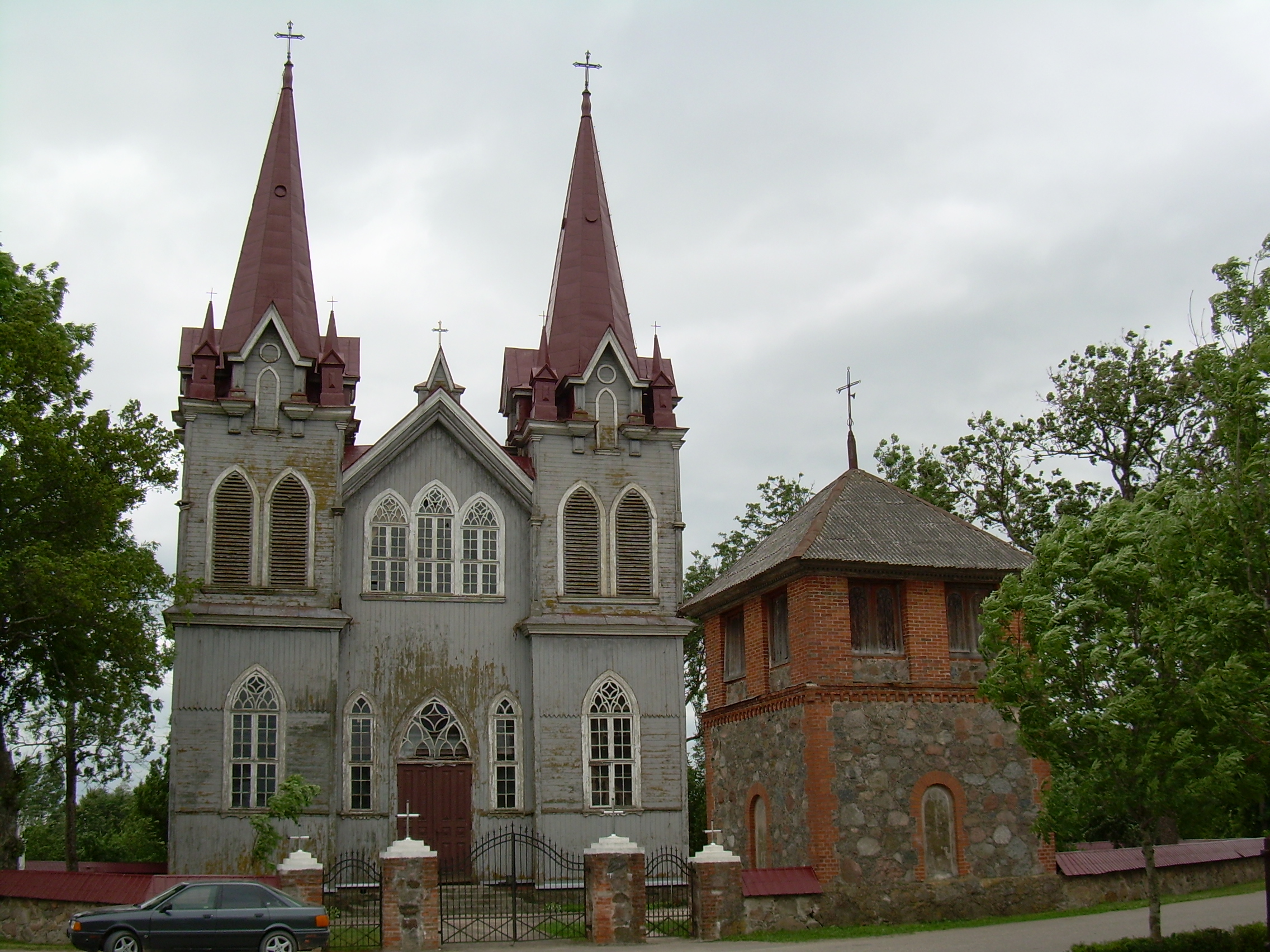 Medingėnų Švč. Trejybės bažnyčia